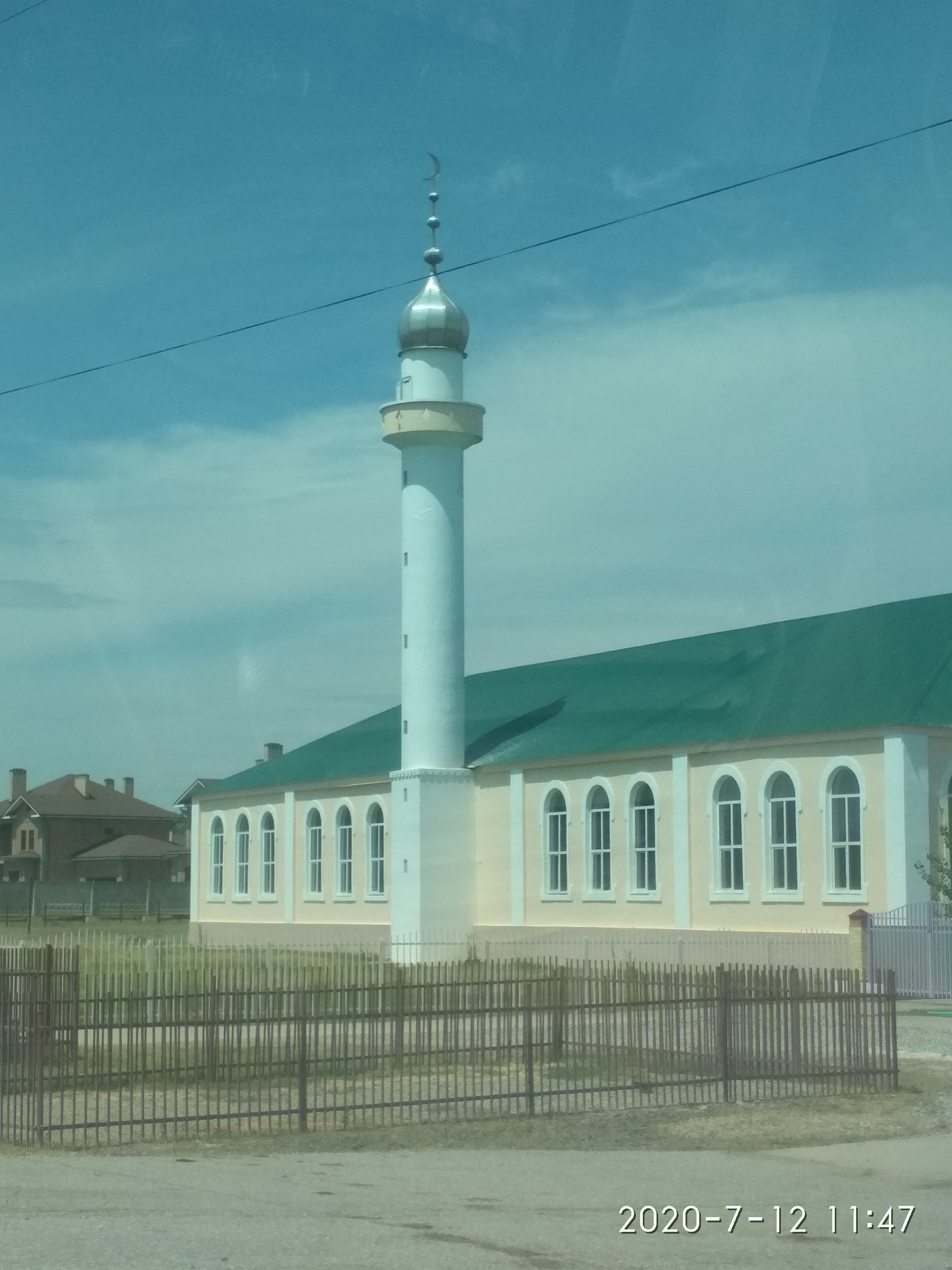 Нохчийн: Эна-Хишкара маьждиг